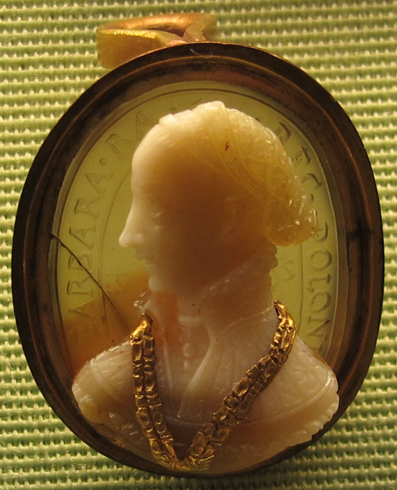 G. caraglio, regina barbara di polonia, agata con applicazioni d'oro, 1550